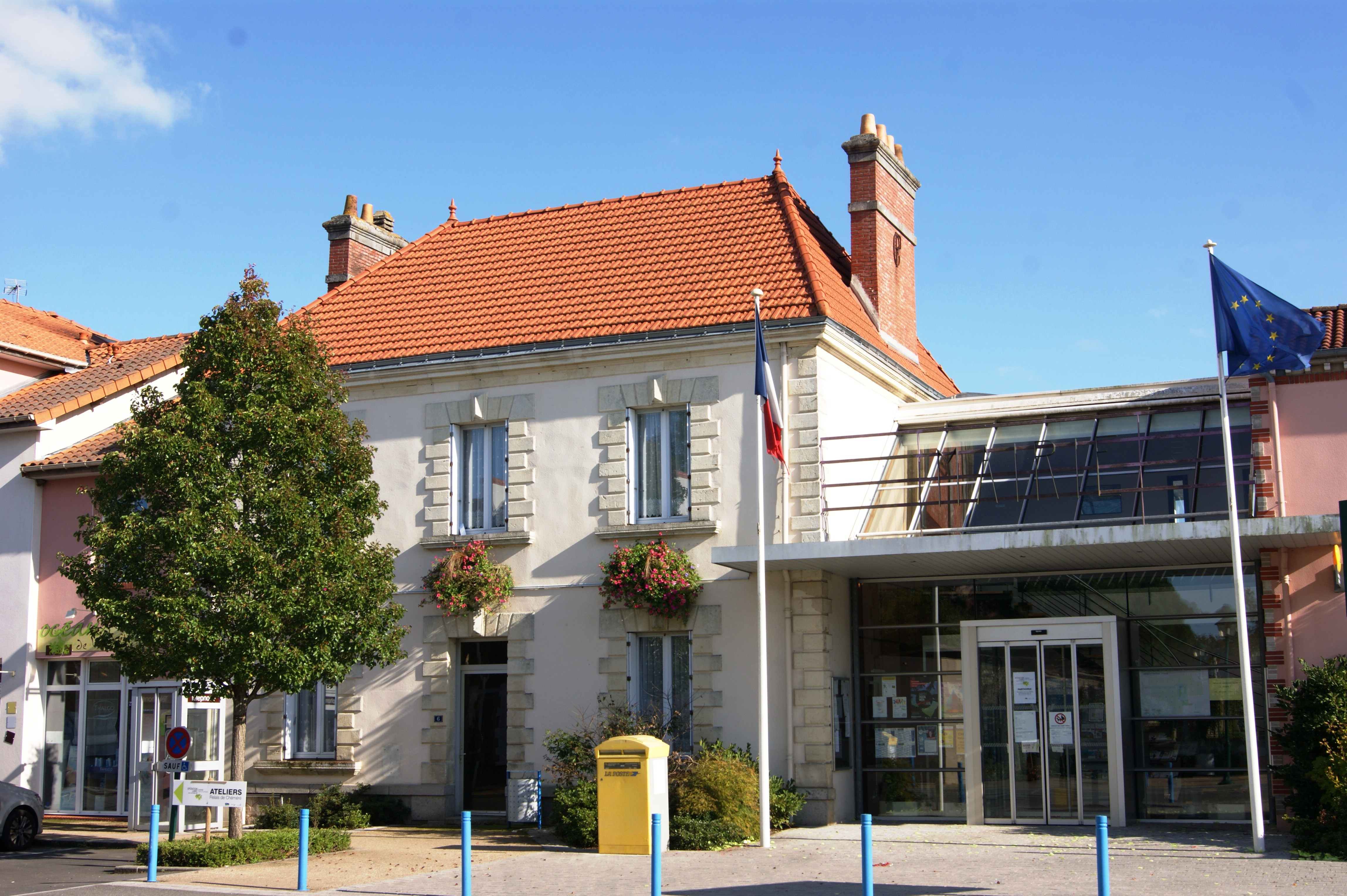 Mairie